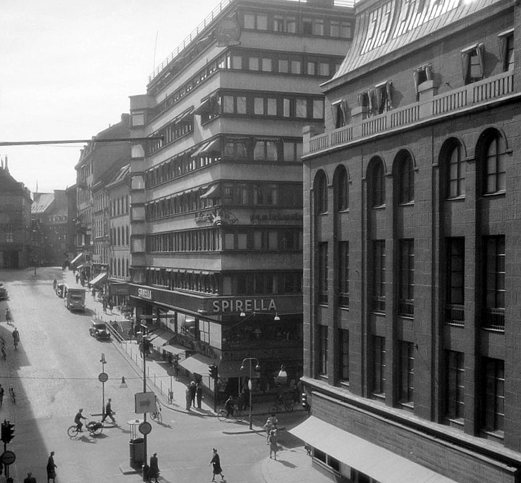 Hästskopalatset i Stockholm till vänster och NK (längst till höger).